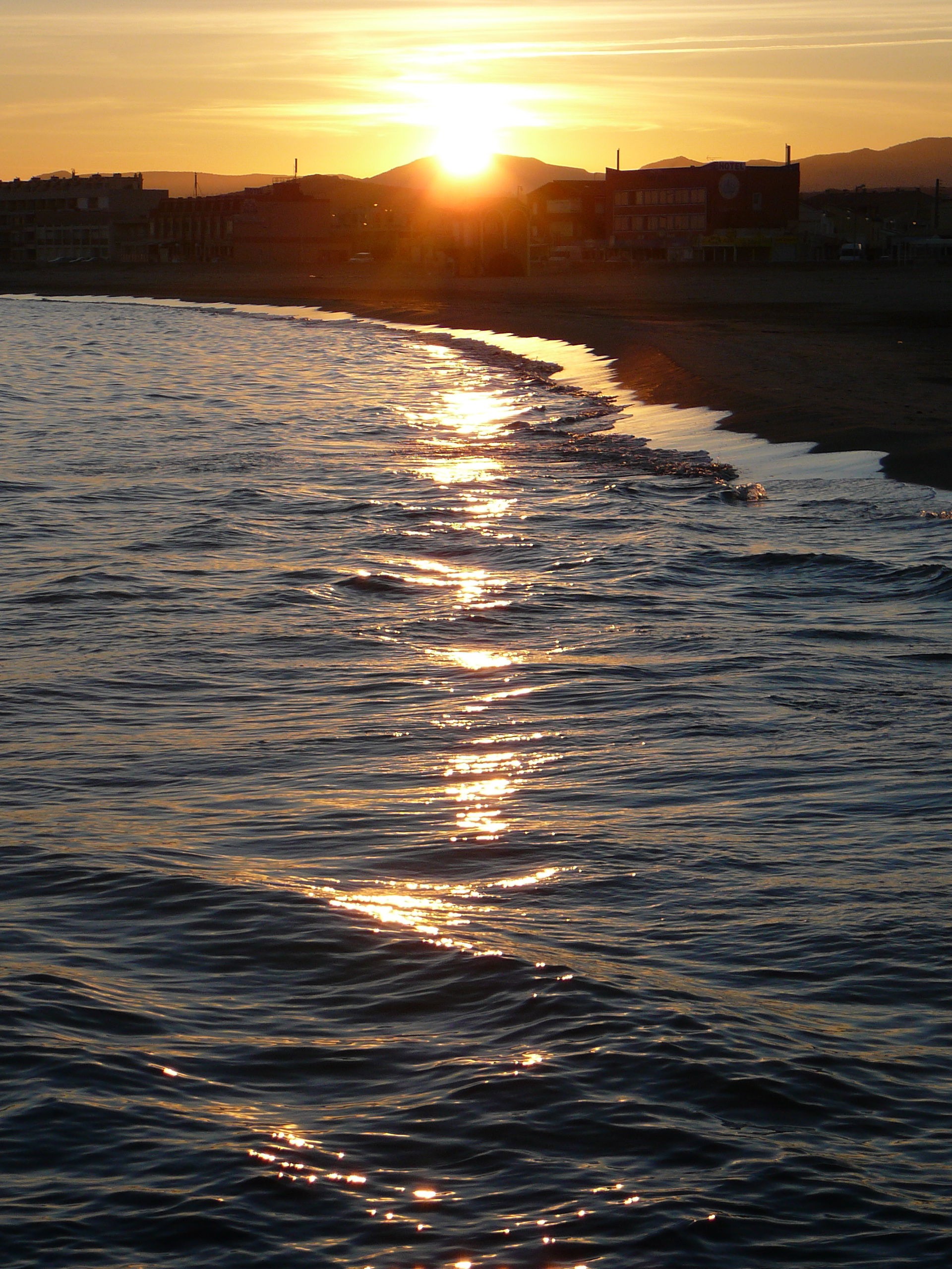 La plage de Port-la-Nouvelle au soleil couchant (photo personnelle de Joyce11).